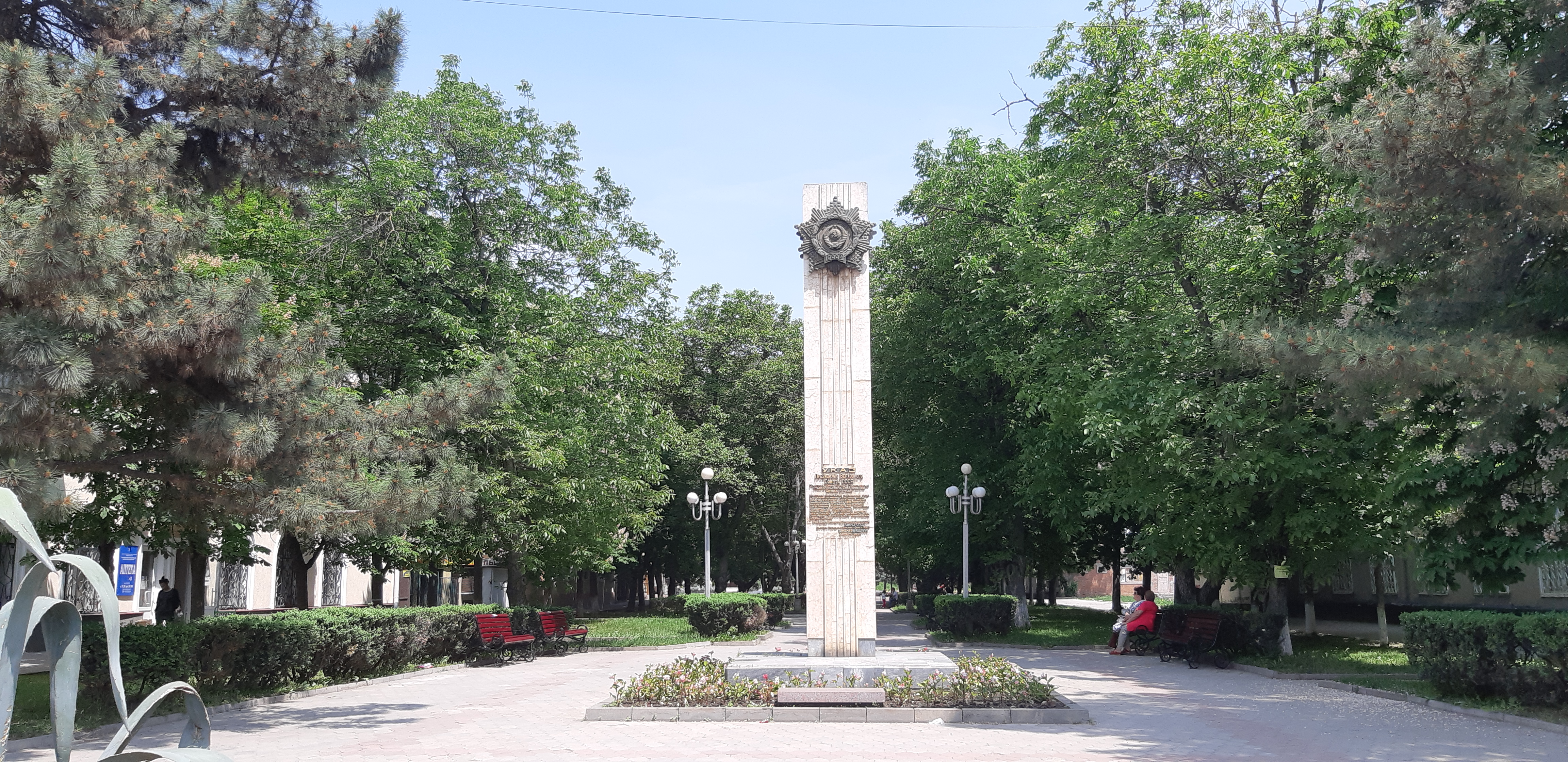 Орден Дружбы в памятть 200 летия Георгиевского трактата с Грузией